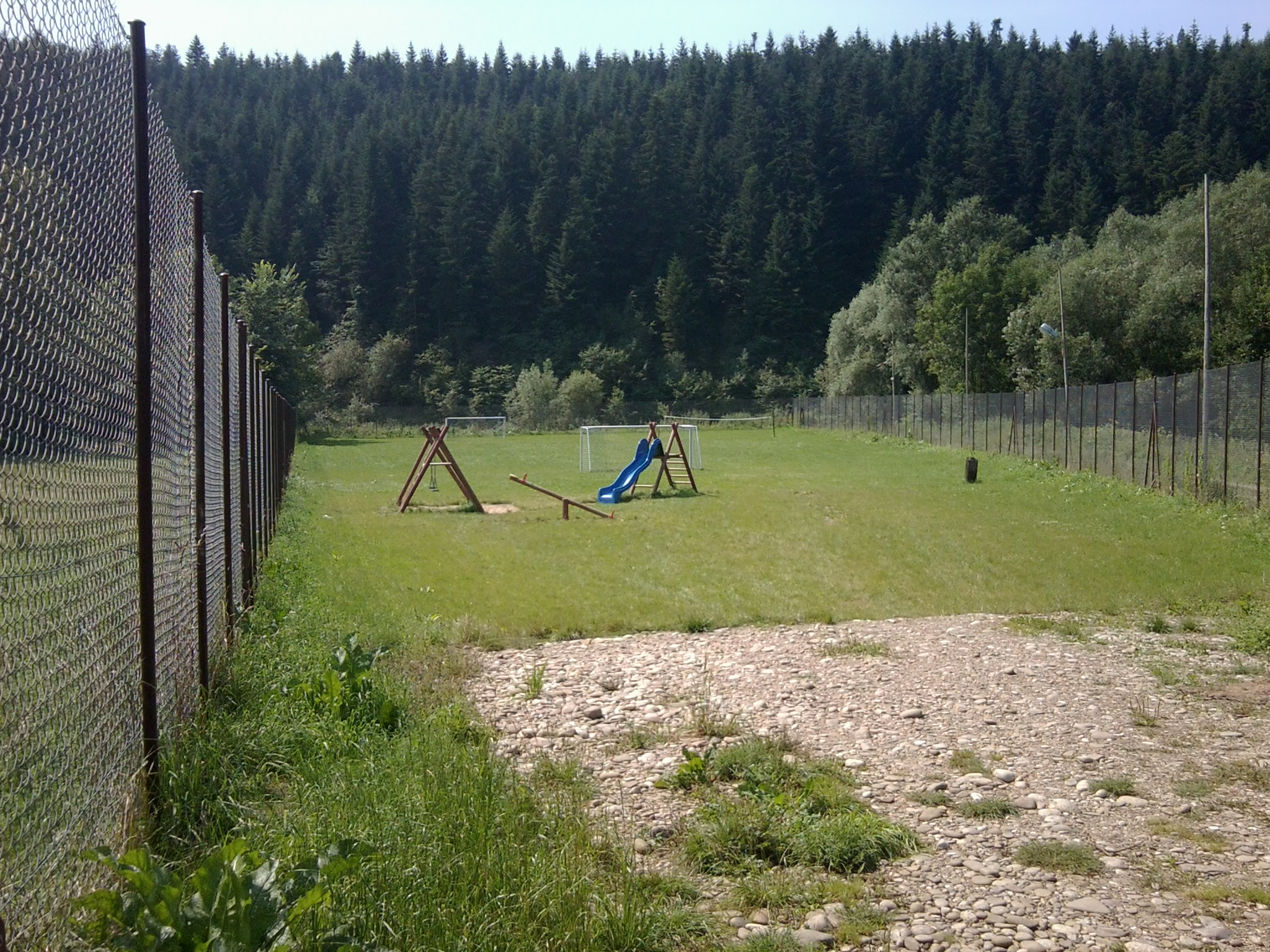 Naszacowice - boisko Orlik Plus